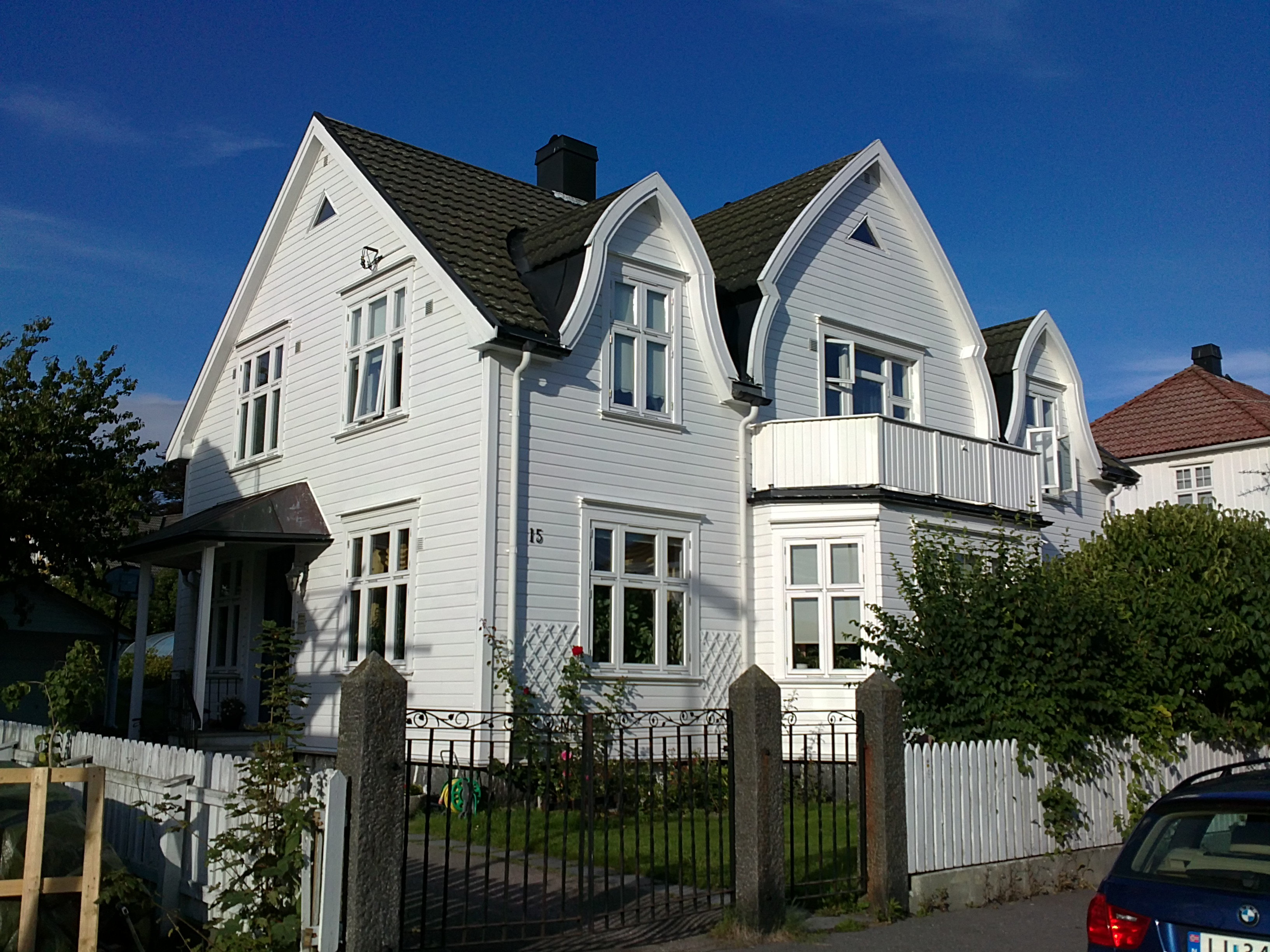 Bilde av Sveins gate 15, Larvik. Herman Sachnowitz' barndomshjem